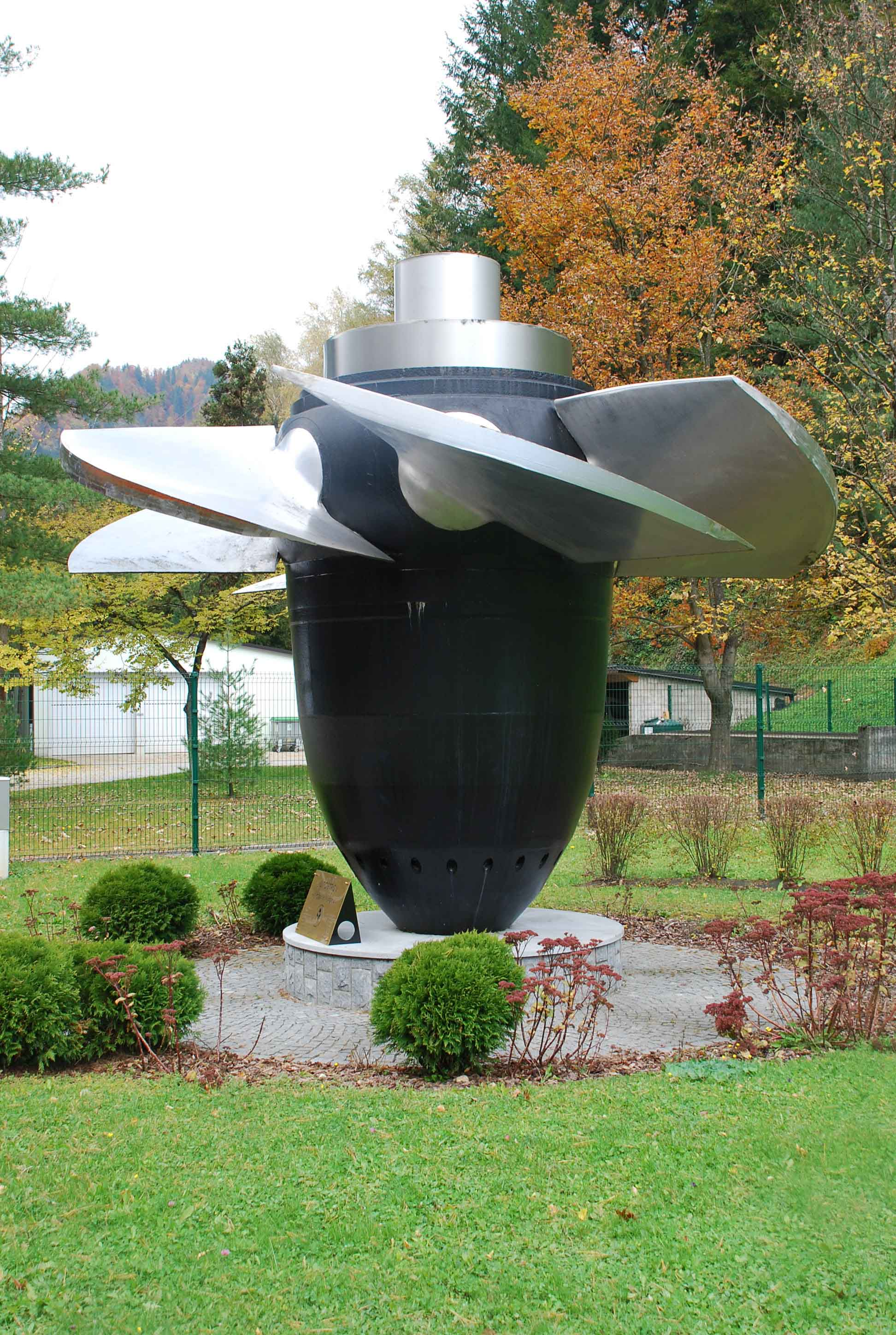 Kaplan-Turbine aus dem Kraftwerk Ožbalt (St. Oswald im Drauwald, St. Oswald an der Drau), Slowenien